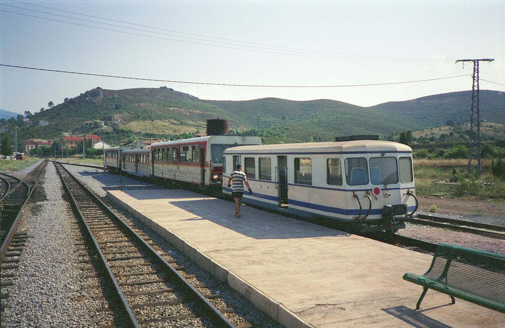 Un train arrivant de Calvi avec au premier plan la remorque XR 211, en gare de Ponte-Leccia le 5 août 1994.